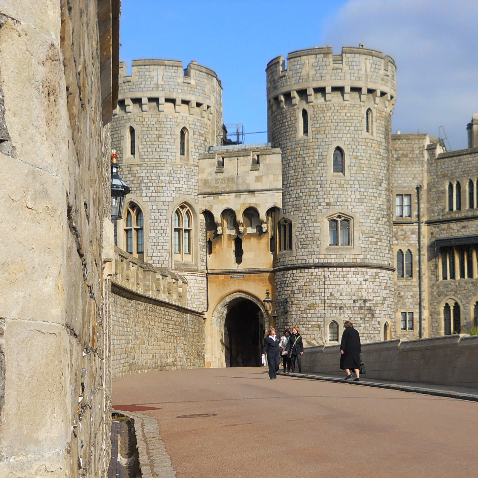 Windsor